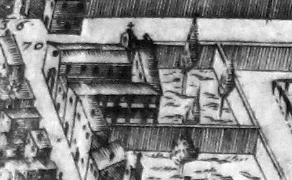 Pianta del buonsignori, dettaglio 070 san ioseppe monastero (Casa famiglia Santa Lucia)